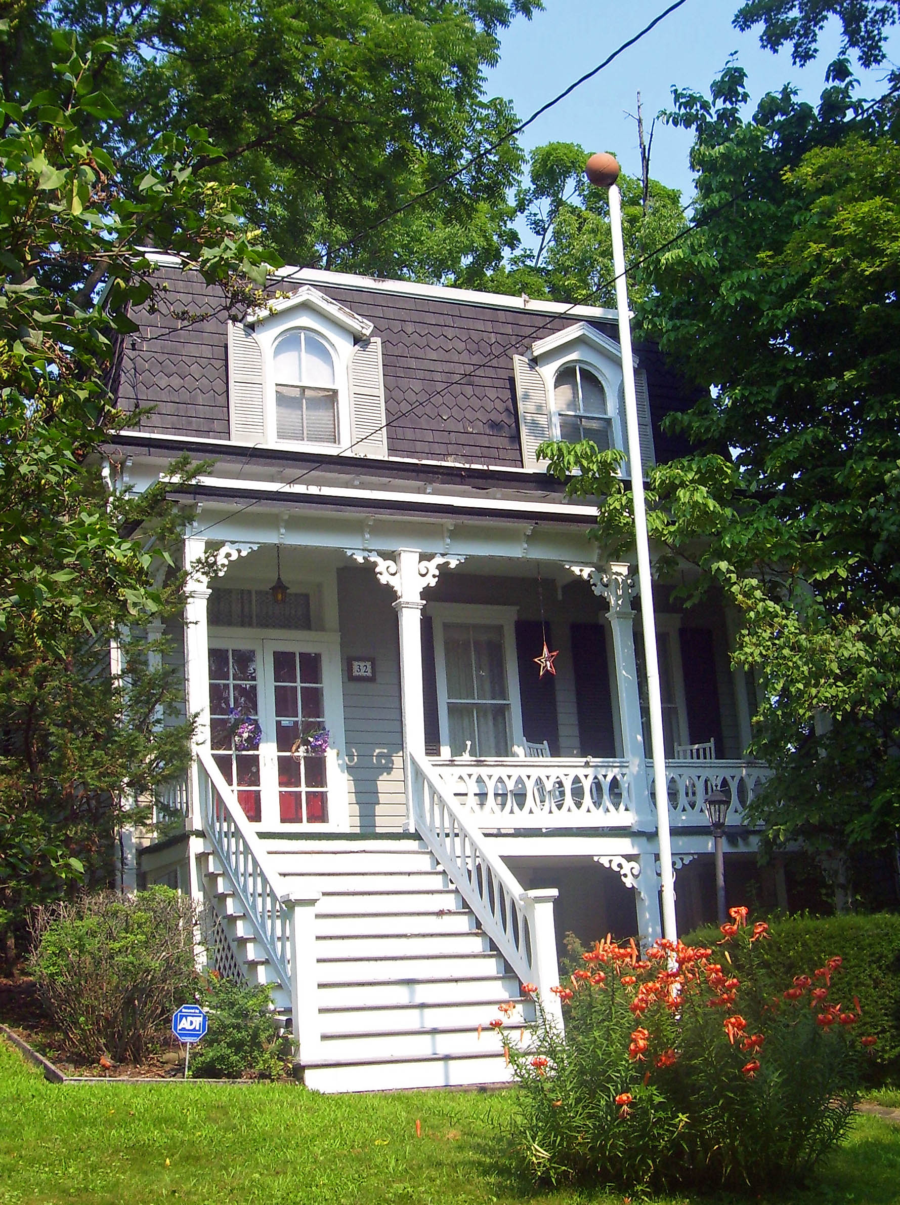 Gilbert Millspaugh House in Walden, NY, USA